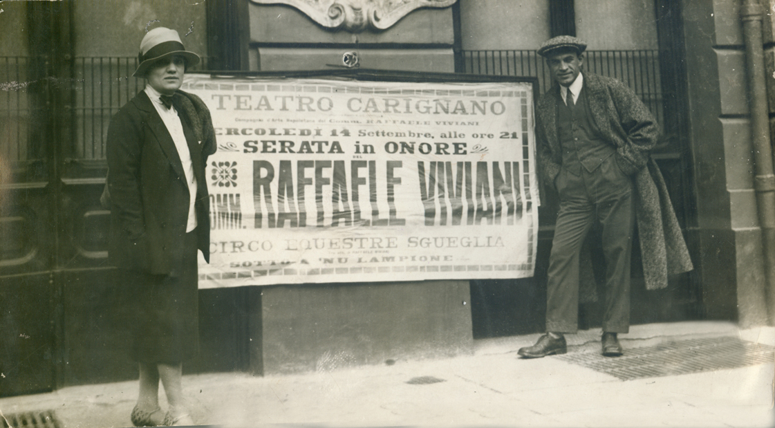 foto di mia proprietà che rappresenta Raffaele Viviani e Luisella Viviani nel 1933 a Torino